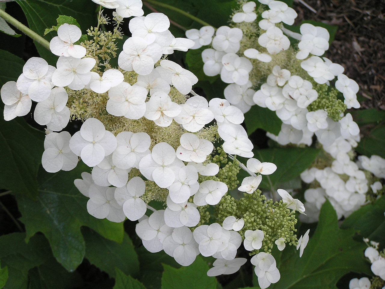 カシワバアジサイ（西脇市 西林寺アジサイ園）